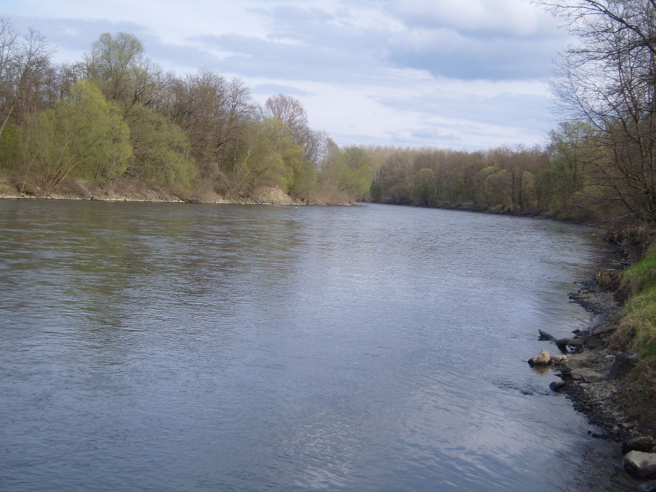 09 Mur bei Krog